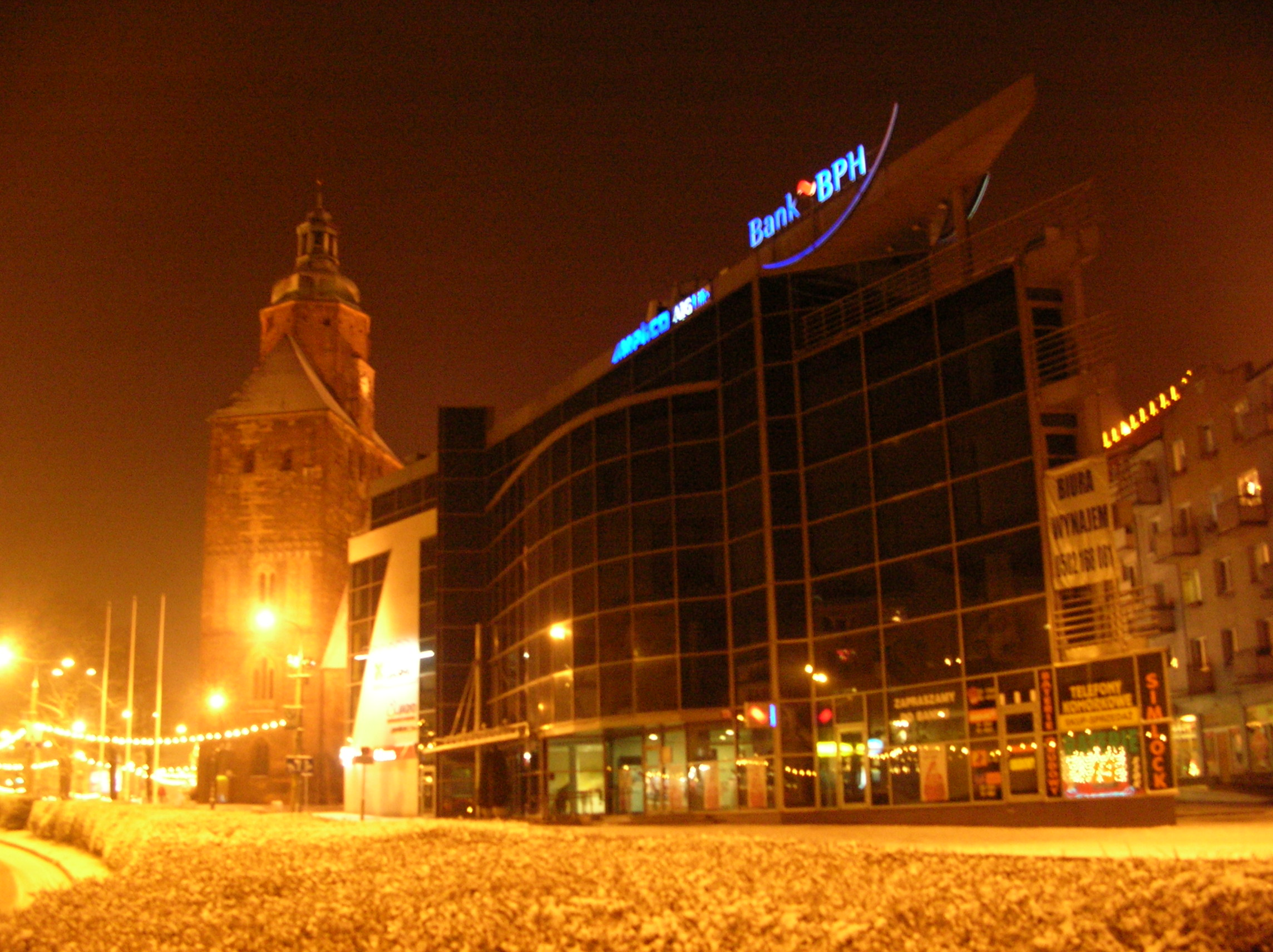 Gorzów - ul.Chrobrego , widok na tzw.Siódemkę w tle katedra pw.NMP Autor : Bartek Wawraszko